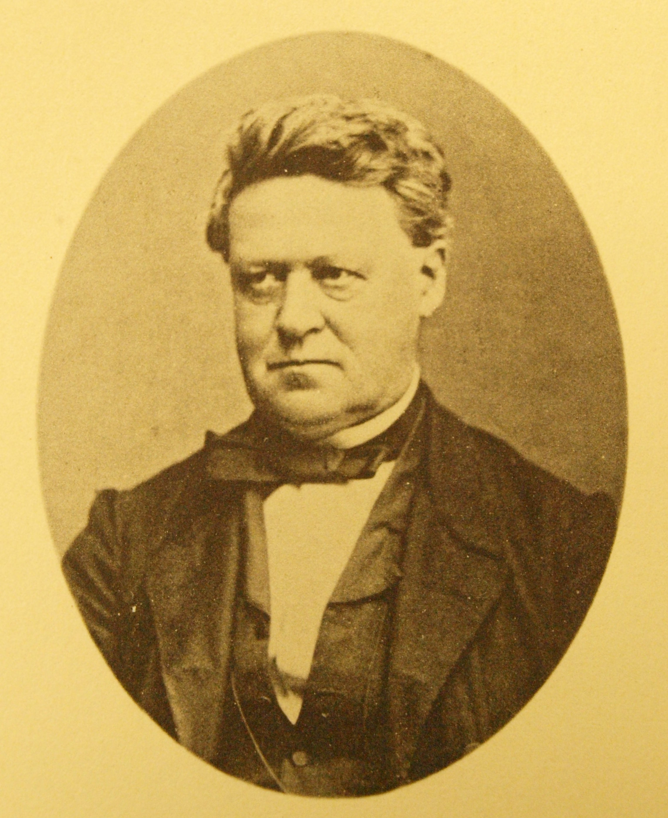 Portrait de Albert-Athanase Callay (1822-1896), botaniste ardennais